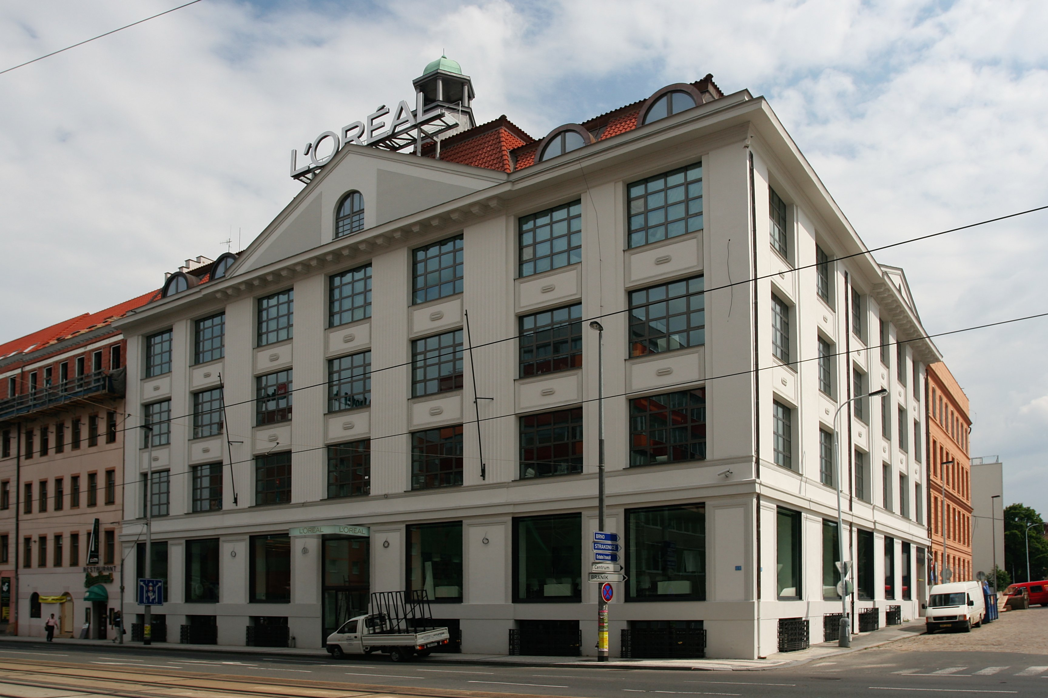 Palác Křižík, Praha Smíchov